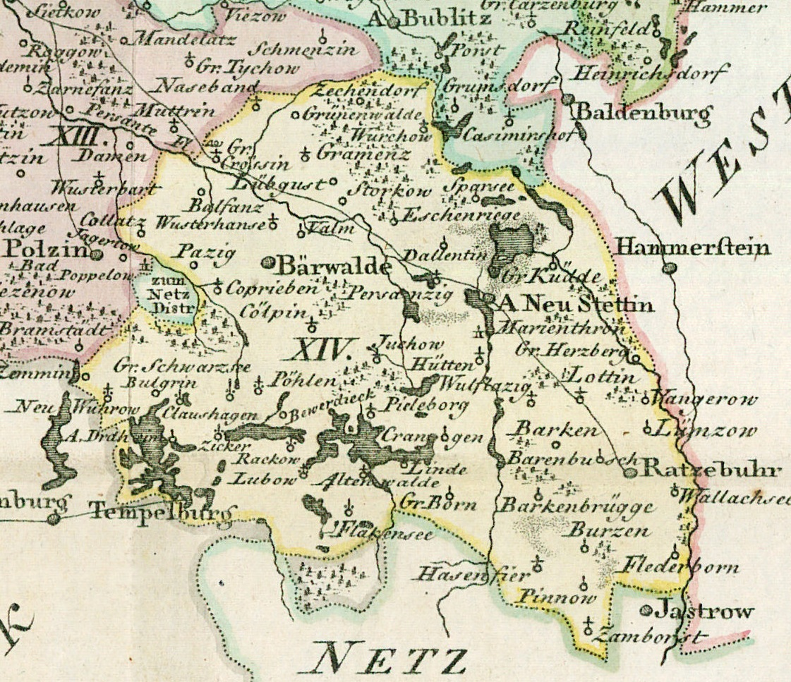 Ausschnitt aus "Landkarte des Herzogtums Vor- und Hinterpommern aus dem Jahr 1794 [1]